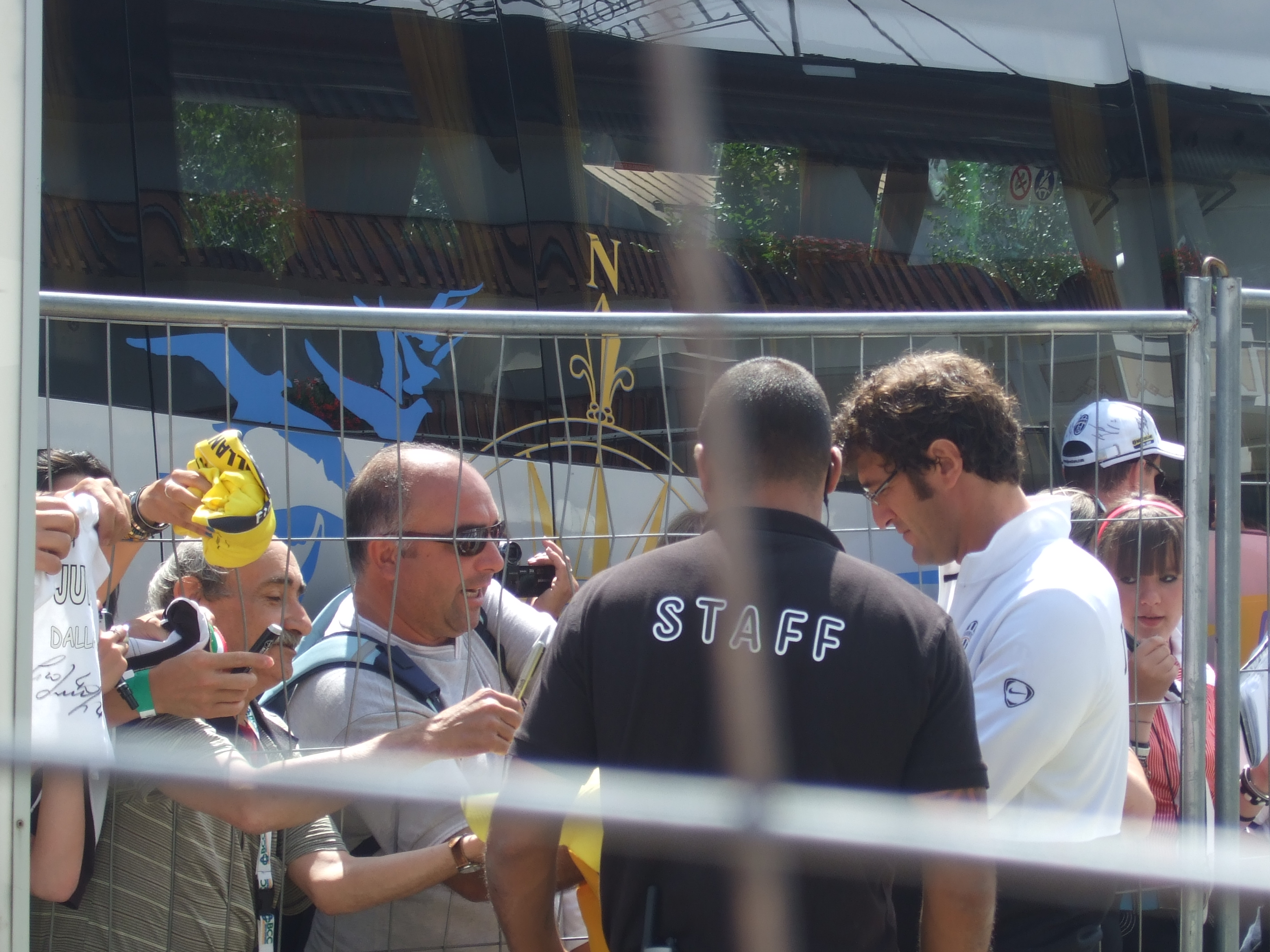 Il calciatore Ciro Ferrara mentre firma degli autografi.